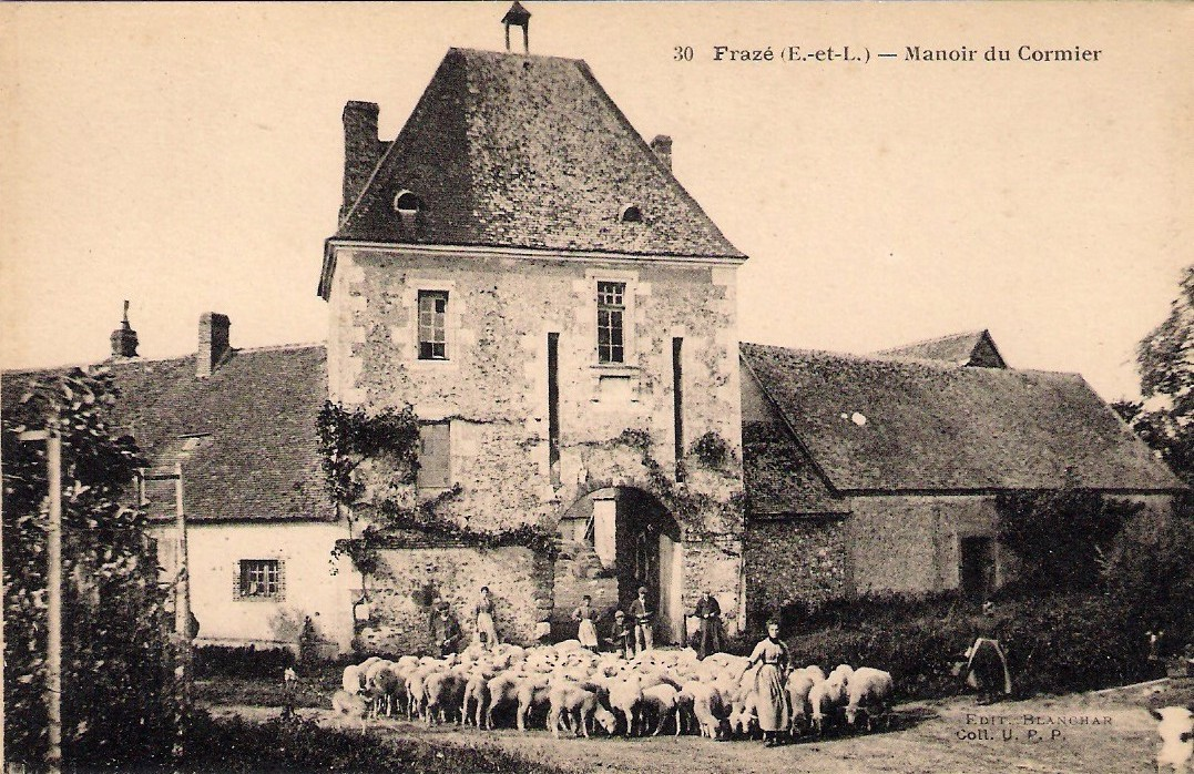 Manoir du Cormier, Frazé, Eure-et-Loir (France).